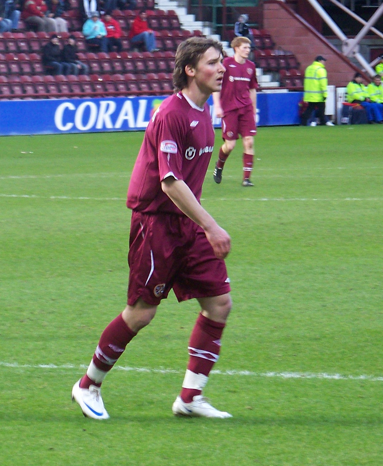 090221 Hearts v St Mirren